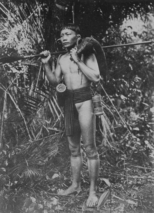 foto. Portret van een Dajak jager op Borneo met een gevangen zwijn over de schouder